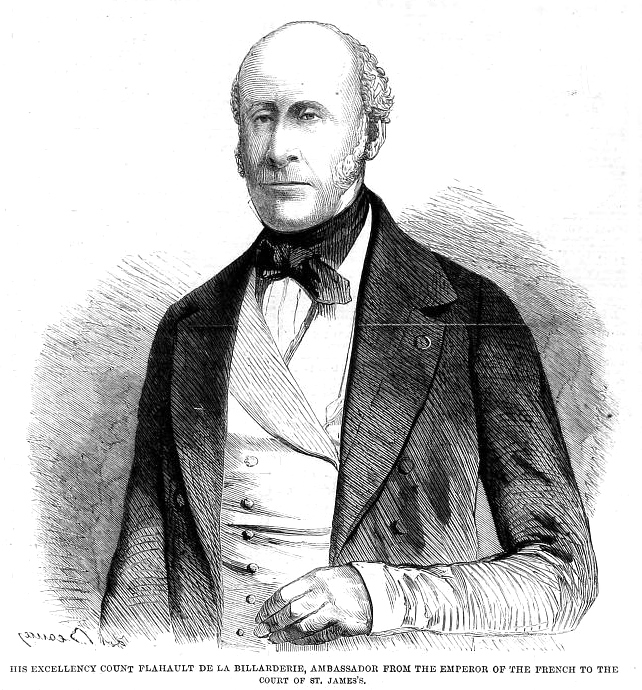 Auguste Charles Joseph de Flahaut de La Billarderie, Comte de Flahaut de La Billarderie[1] (21 April 1785 – 2 September 1870)